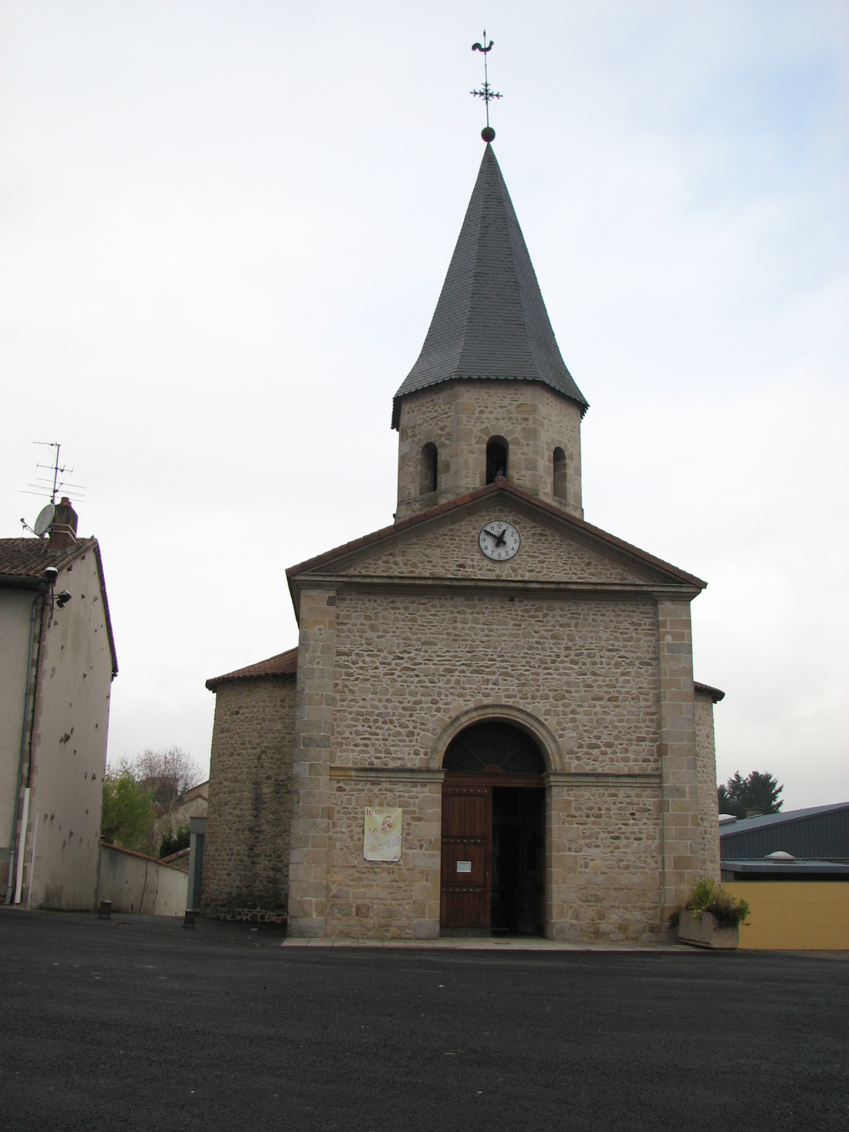 Église de Nantiat (Haute-Vienne)